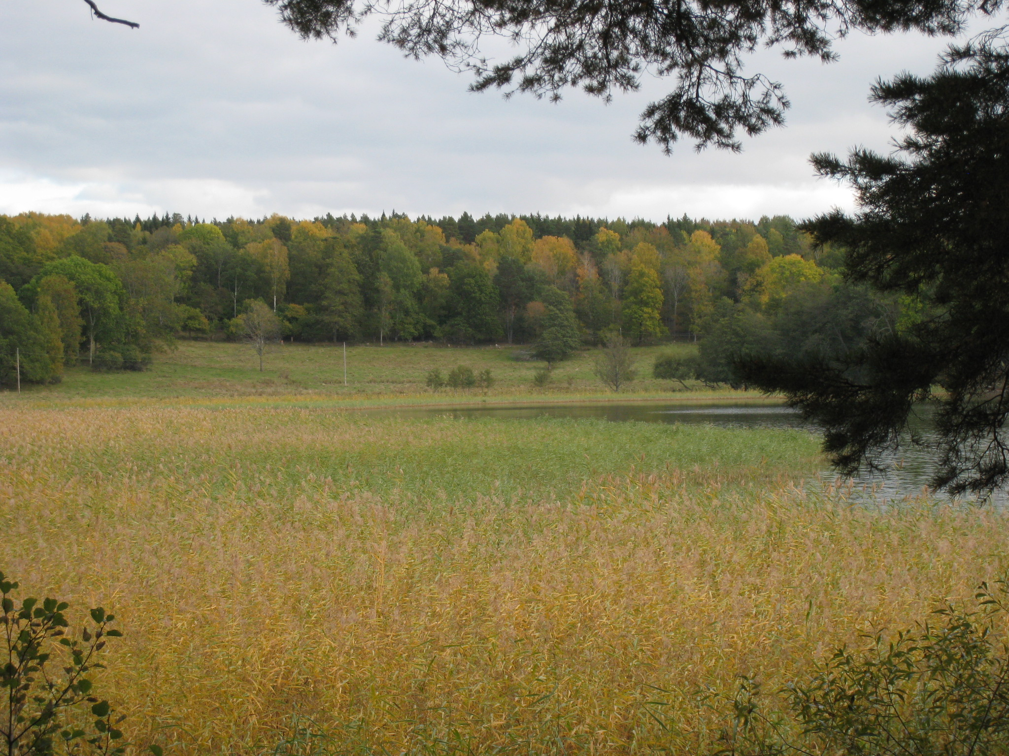 Hummelmora hage, vy från Skäftingeholmen mot Hummelmora, Järfälla kommun, Stockholms län.